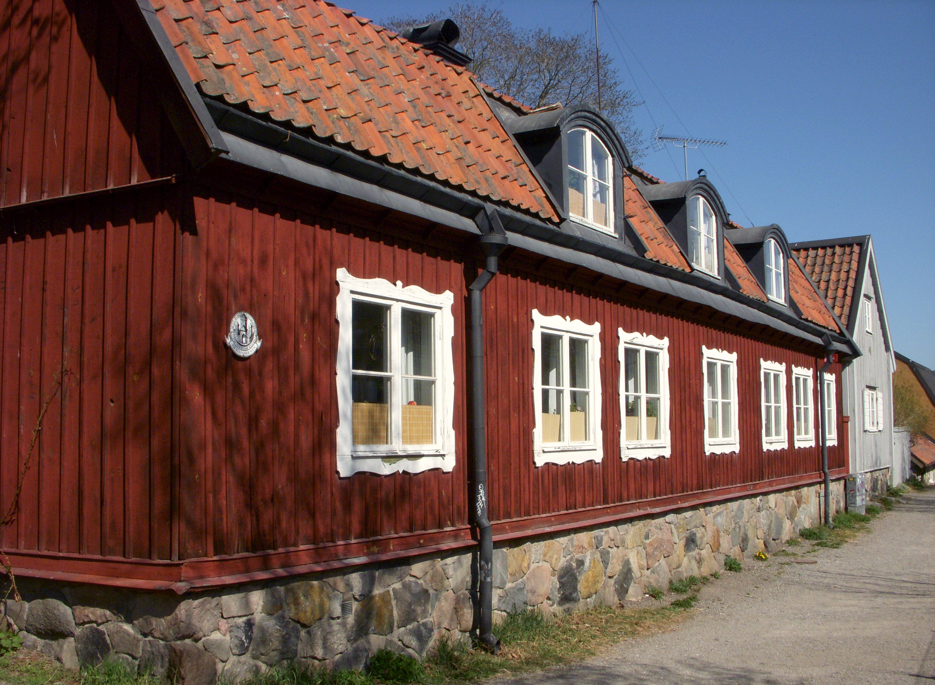 Gamla Lundagatan 12 och 10 i fastigheten Haren 6